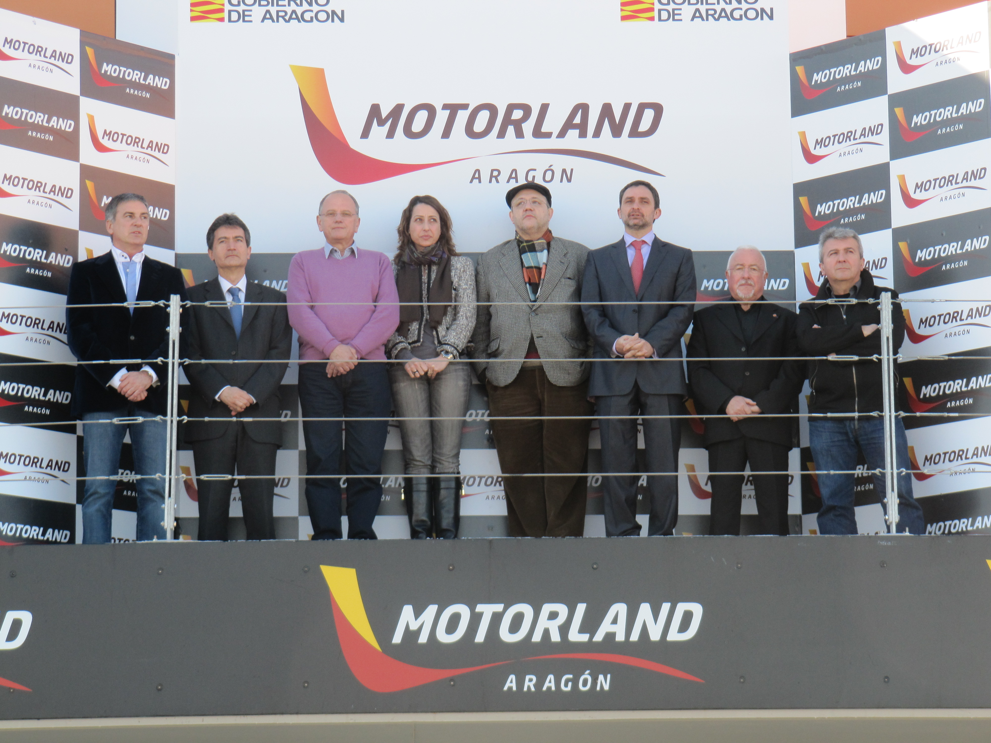 Les adhérents au Réseau Eurorégional de Radio et de Télévision Sans Frontières (TSF Network) sur le podium du circuit de vitesse MotorLand Aragón (Alcañiz)